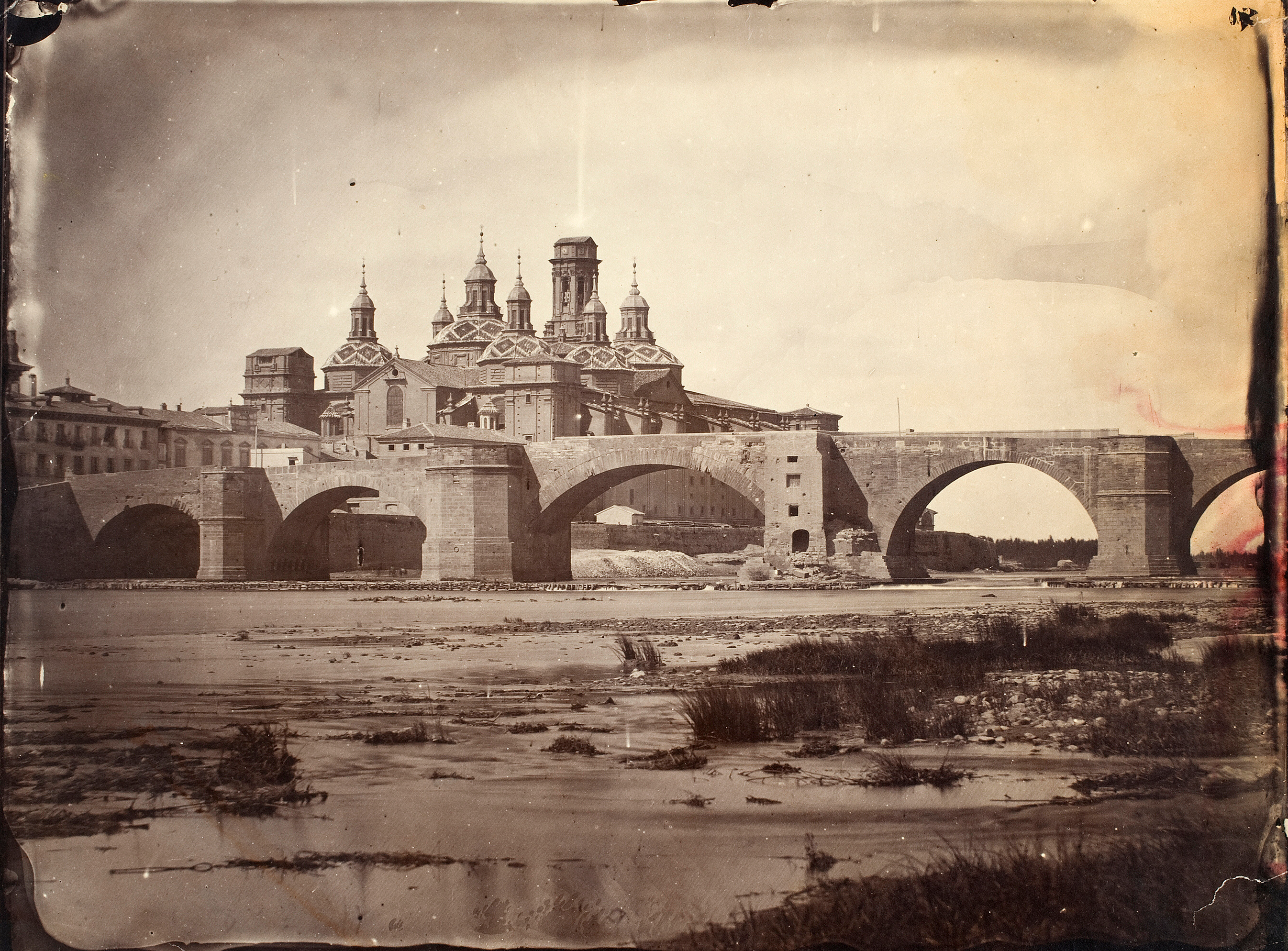 Vista posterior de la Basílica del Pilar de Zaragoza, con el Puente de Piedra. Antes de 1866, albúmina sobre papel, 190 x 253 mm.